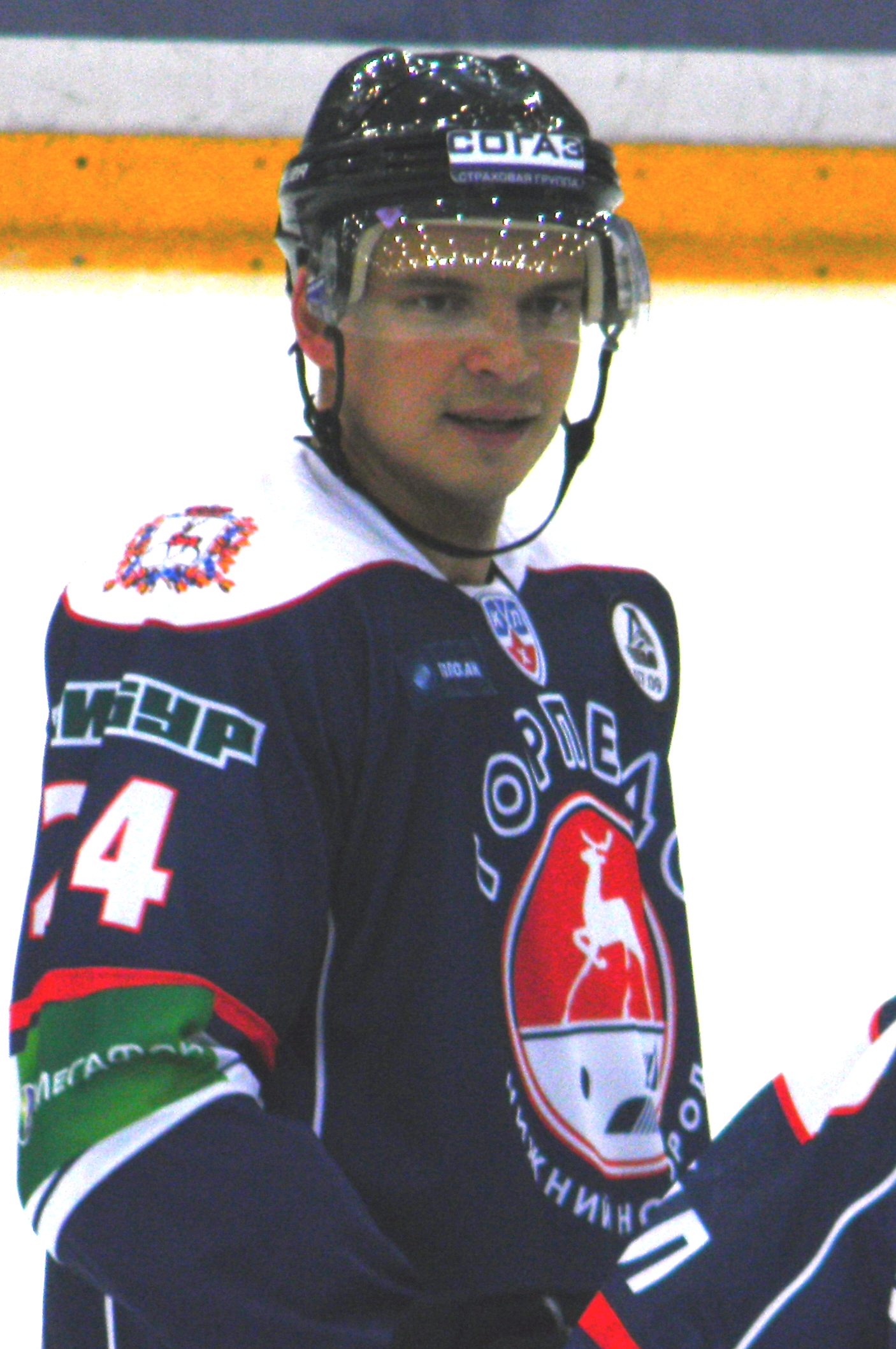 Maxim Potapov, a hockey player from Torpedo Nizhny Novgorod